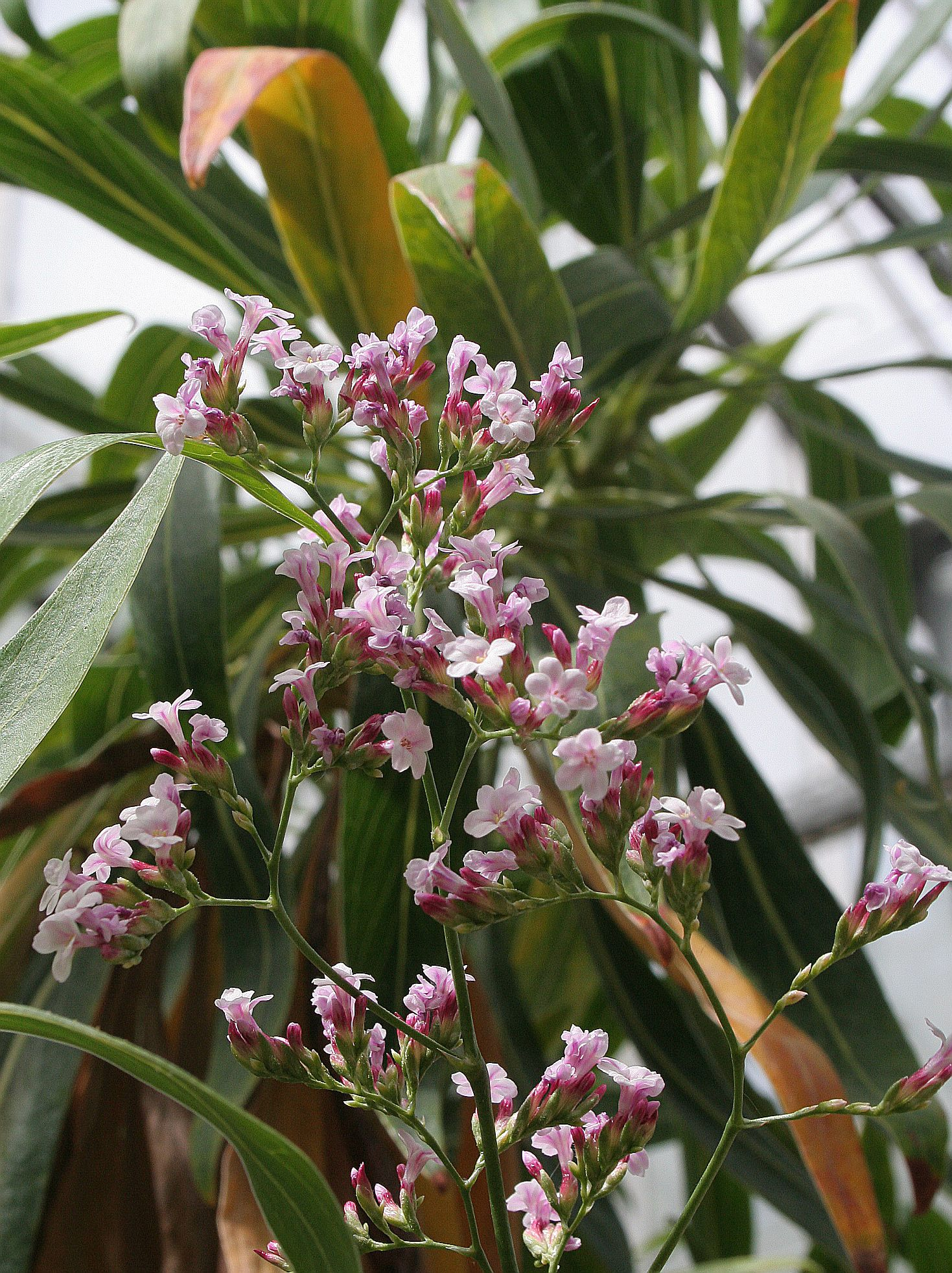 Limonium dendroides Conservatoire botanique national de Brest, France, juin 2007